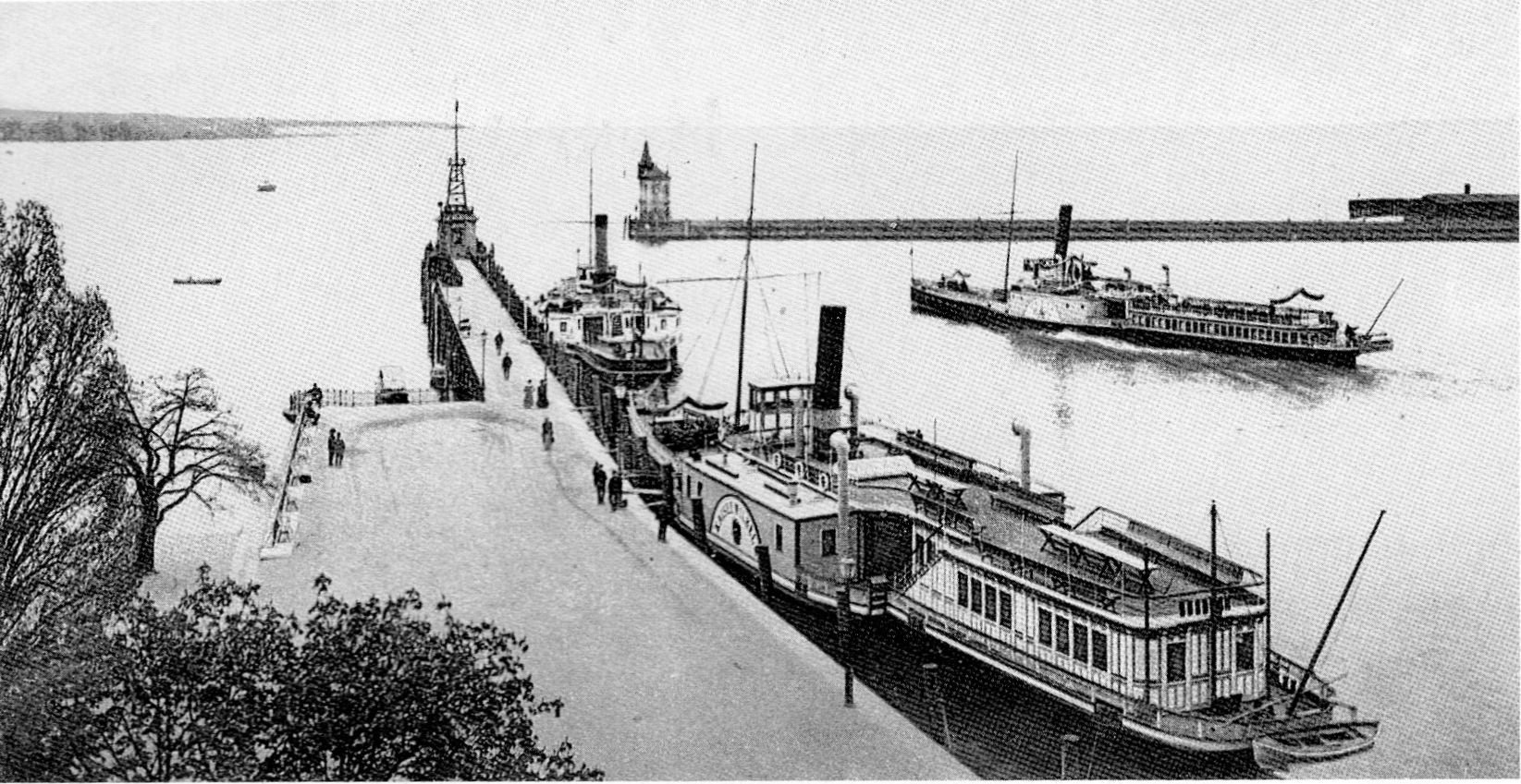 festgemacht sind "Kaiser Wilhelm" und "Habsburg", die "Greif" läuft aus